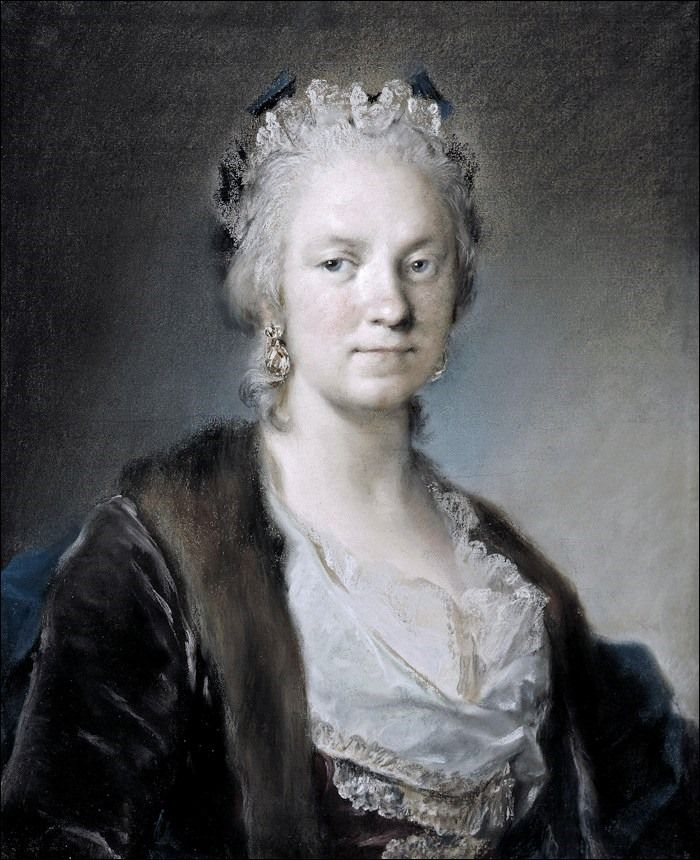 Rosalba Carriera Selbstporträt. Carriera schenkte das Bild ihrem Mäzen Joseph Smith (Konsul), aus dessen Nachlass gelangte es in die Royal Collection. Frances Vivian, Die Sammlung des Consul Smith: Meisterwerke italienischer Zeichnung aus der Royal Library, Windsor Castle. Von Raffael bis Canaletto Hirmer, München 1989, S. 19 Michael Levey: The later Italian pictures in the collection of Her Majesty the Queen. London, Phaidon Publishers, 1964, 442, 446